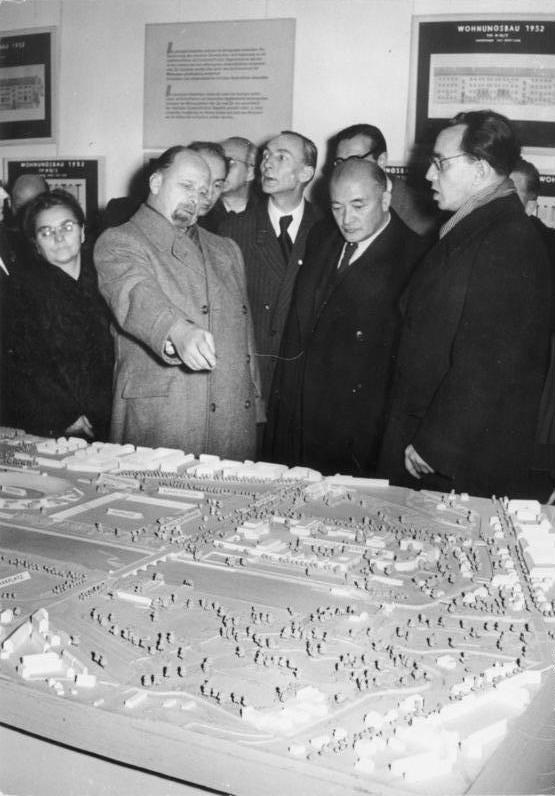 Zentralbild "Im Kampf um eine deutsche Architektur" Unter diesem Motto wurde am 9.12.51 im Haus des Nationalrates in Berlin eine Ausstellung zur Einweihung der Deutschen Bauakademie eröffnet. UBz: Der Stellvertr. Ministerpräsident Ulbricht erklärt dem Stalinpreisträger A. Wlassow, Mitglied der Akademie für Architektur der UdSSR und verantwortlicher Sekretär des Verbandes sowjetischer Architekten (2.v.r.) die Anlage der Deutschen Hochschule für Körperkultur in Leipzig. Ganz rechts der Präsident der Deutschen Bauakademie Dr. [Kurt] Liebknecht.